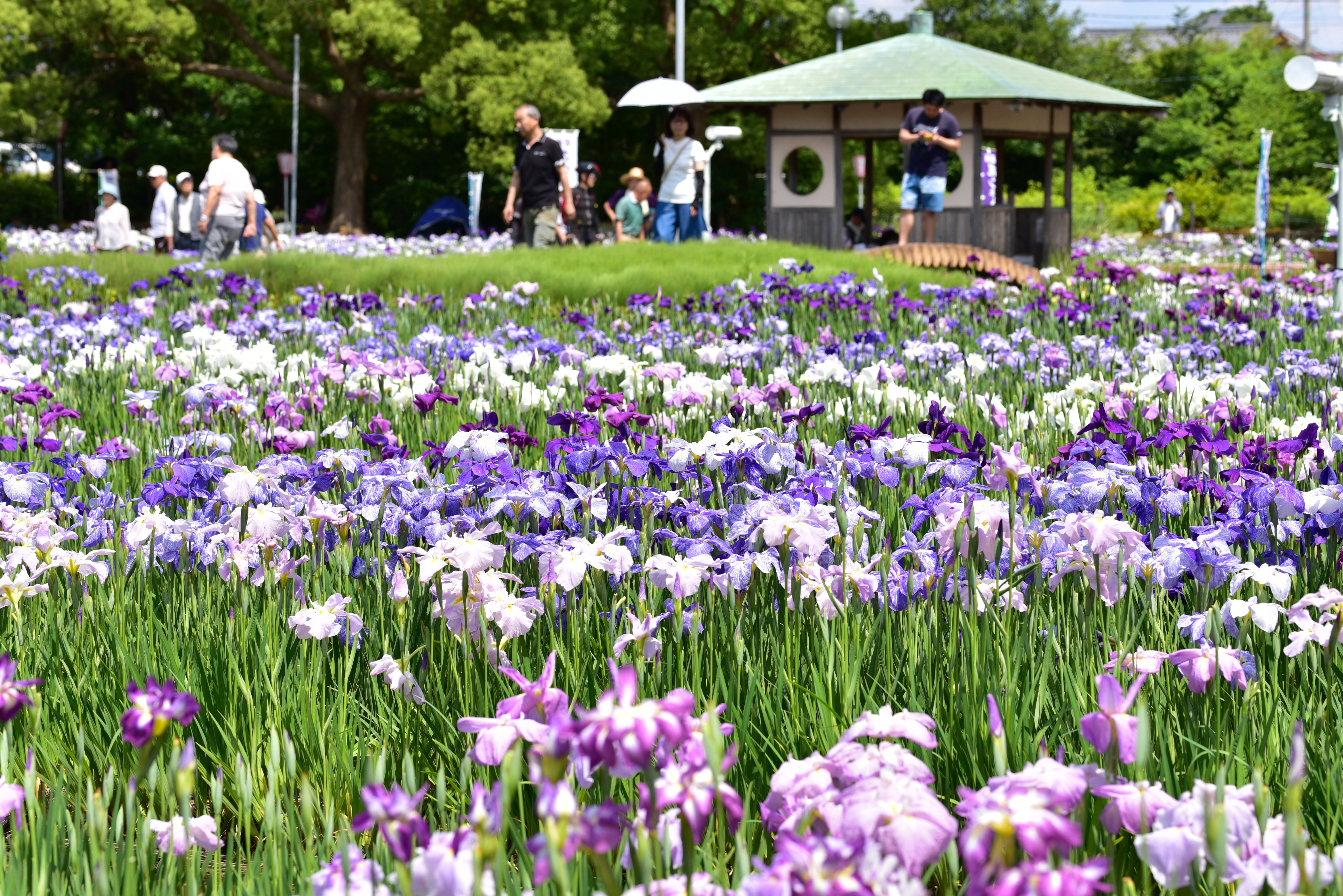 油ケ渕遊園地